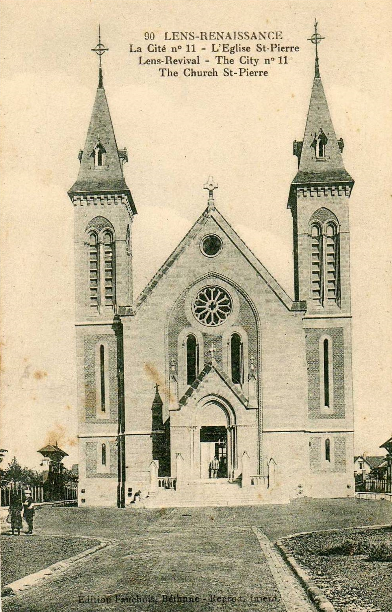 Église Saint-Pierre des cités de la Fosse n° 11 - 19 de la Compagnie des mines de Lens, disparue, Lens, Pas-de-Calais, Nord-Pas-de-Calais, France.